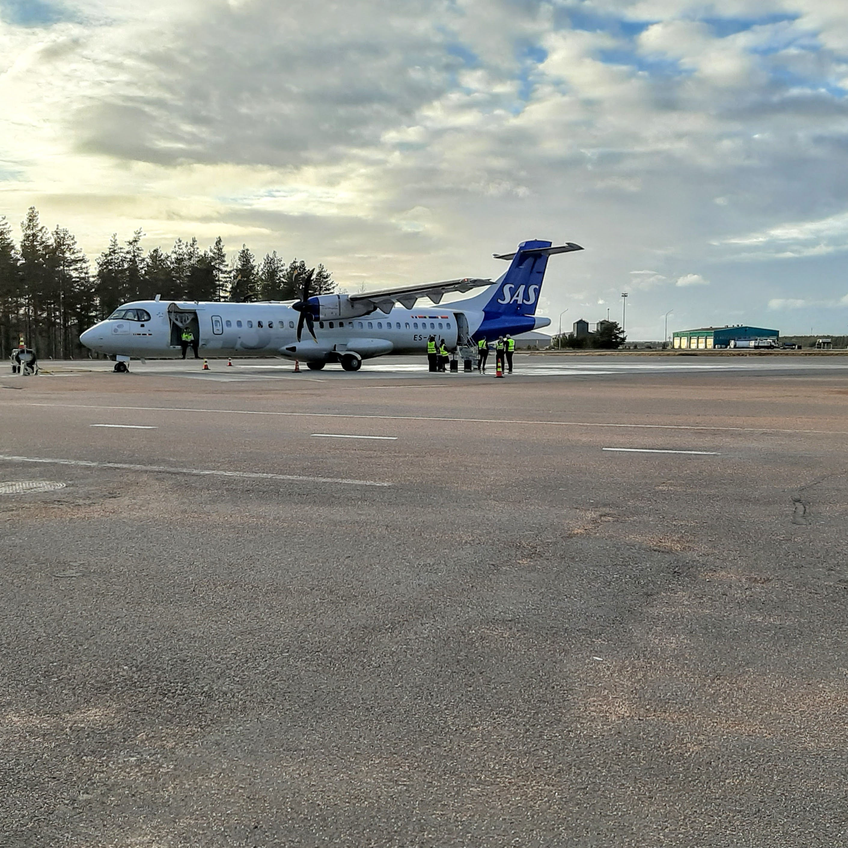 SAS ATR 72-600